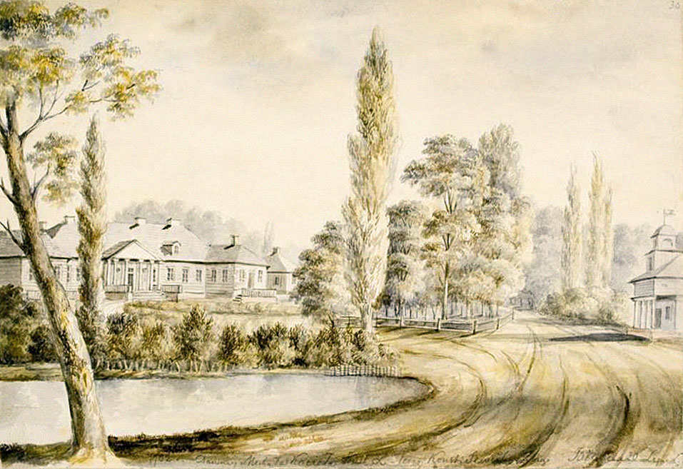 Беларуская (тарашкевіца): Беніца (Bienica), сядзіба Коцелаў (Kocieł)